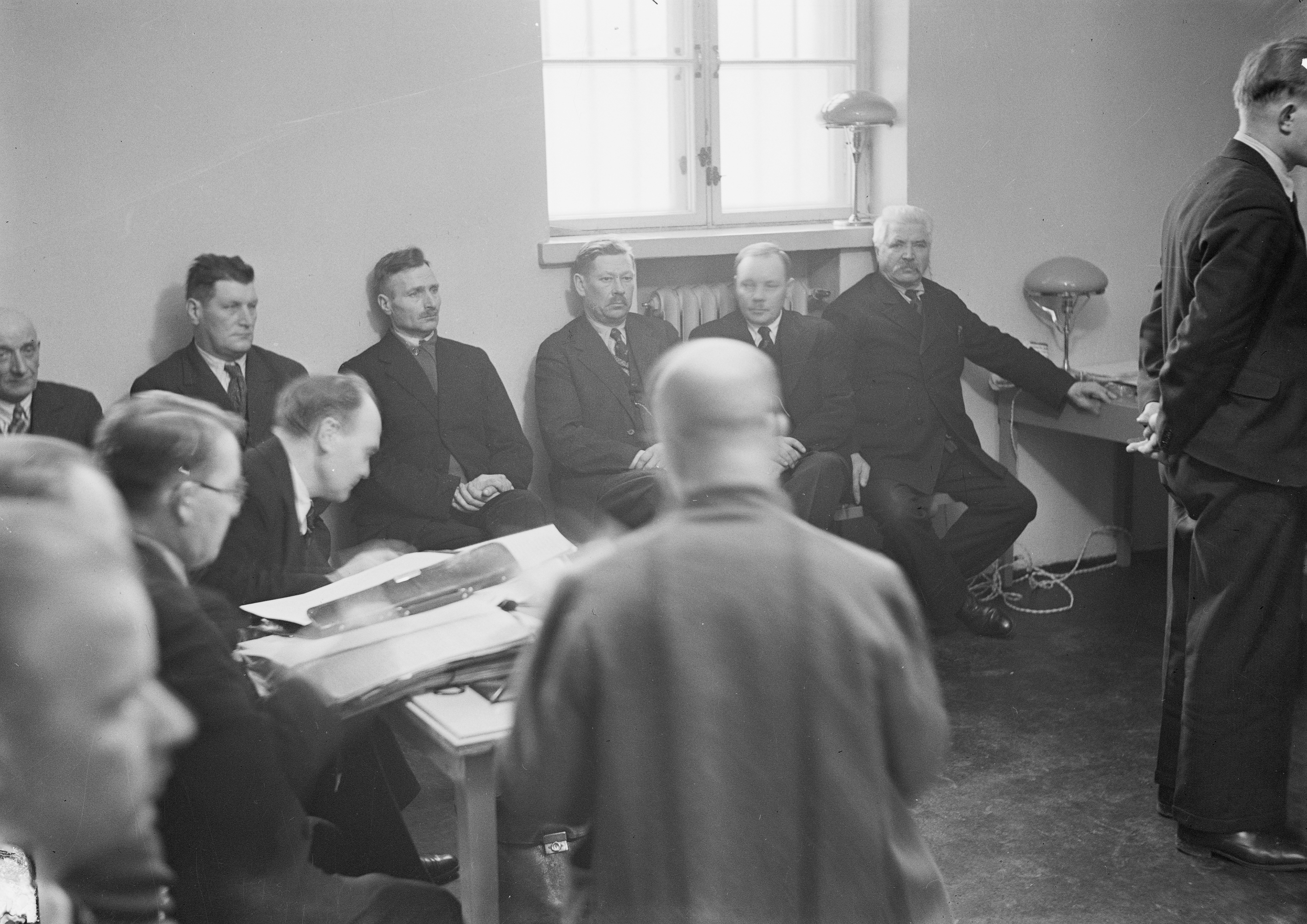 Selin kameraan olevan Toivo Antikaisen oikeudenkäynti 1936